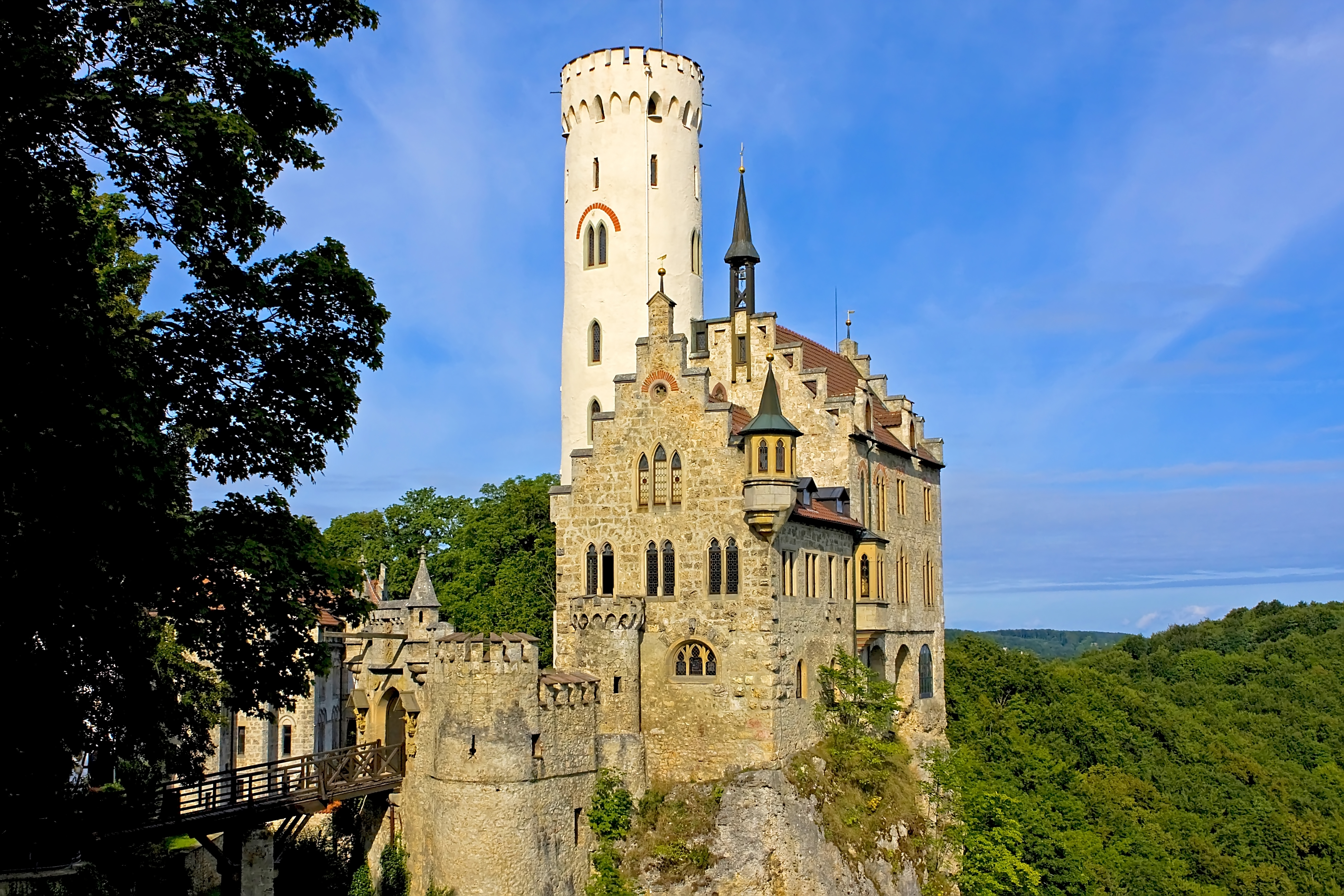 Castilllo del siglo XIX en los montes Suabos cerca de Stuttgart.